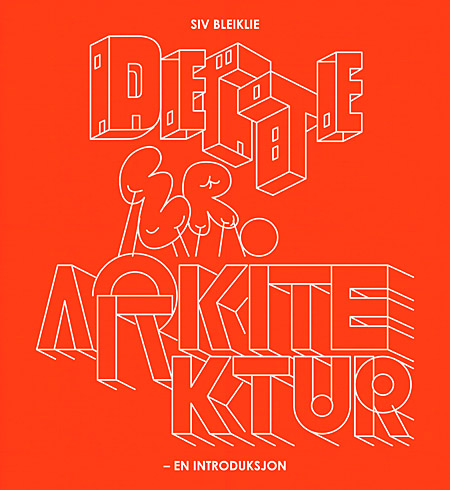 Bokforside, "Dette er arkitektur". Publisert 2017. Kunstner: Kim Hiorthøy (Norge). Forfatter, arkitekt: Siv Bleiklie (Norge)